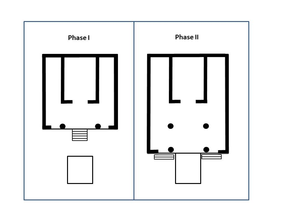 Aire de Sant'Omobono, plan du temple archaïque, en deux étapes de construction, selon Giovanni Colonna